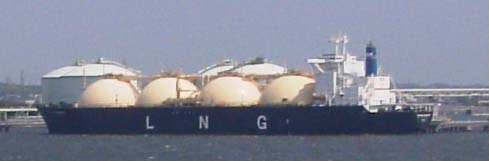 LNGタンカーの写真（自分で撮影）。